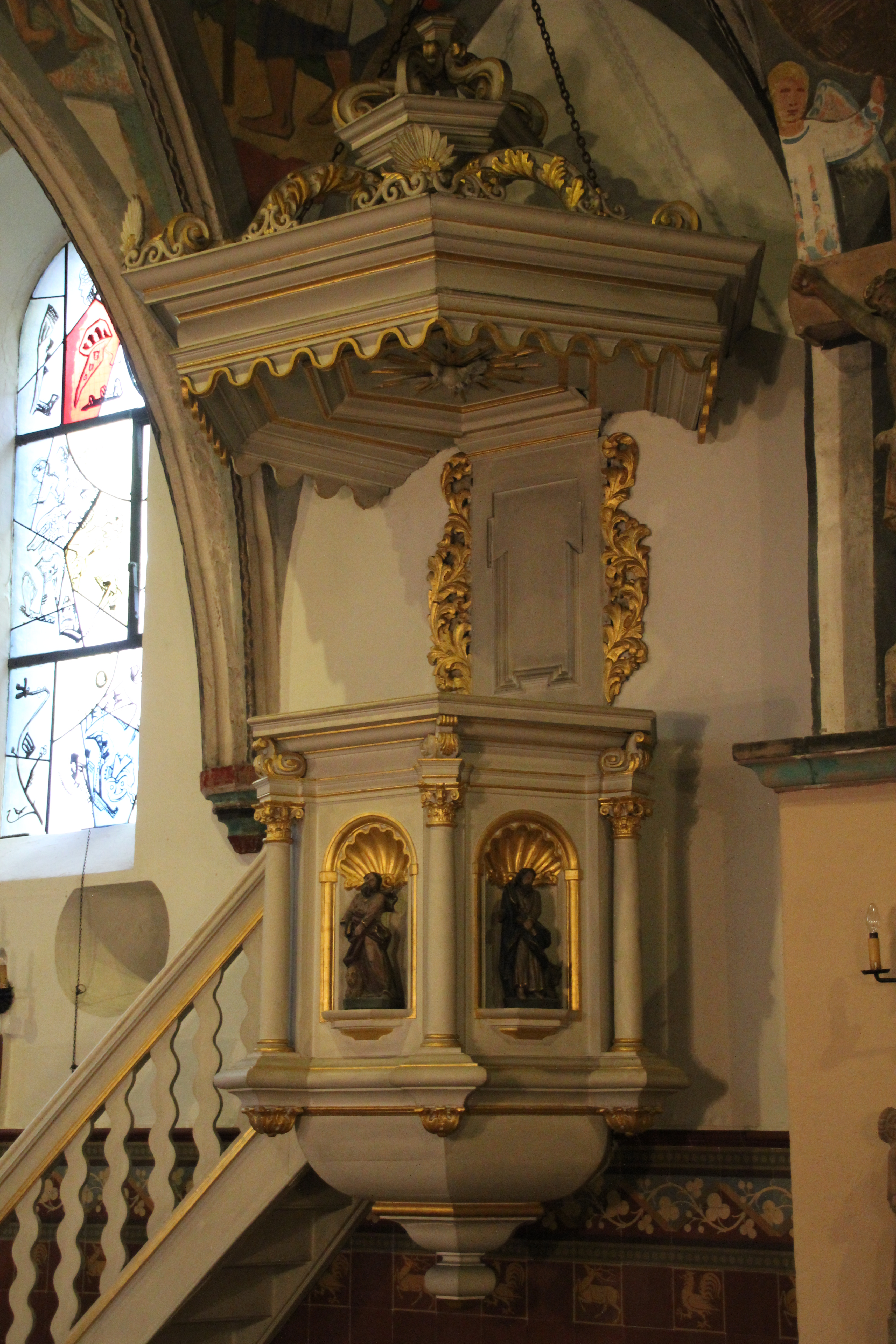 Barocke Kanzel in Klein St. Arnold in Arnoldsweiler aus dem 17. oder 18. Jahrhundert.